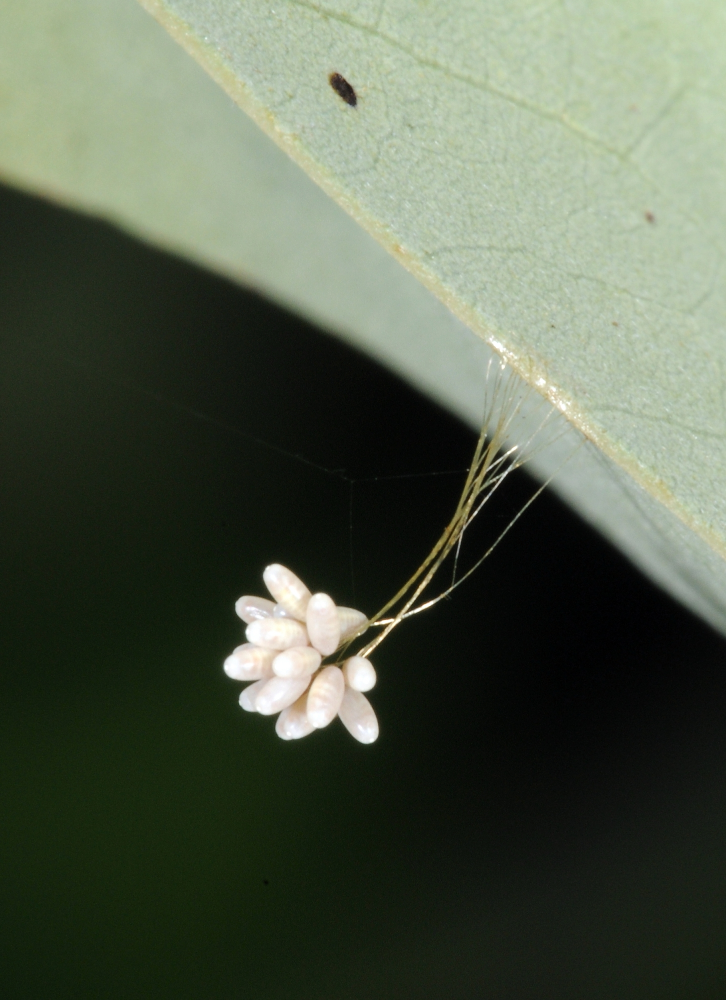 cf. Chrysopidae Eier, Mainzer Sand, Rheinland-Pfalz, Deutschland